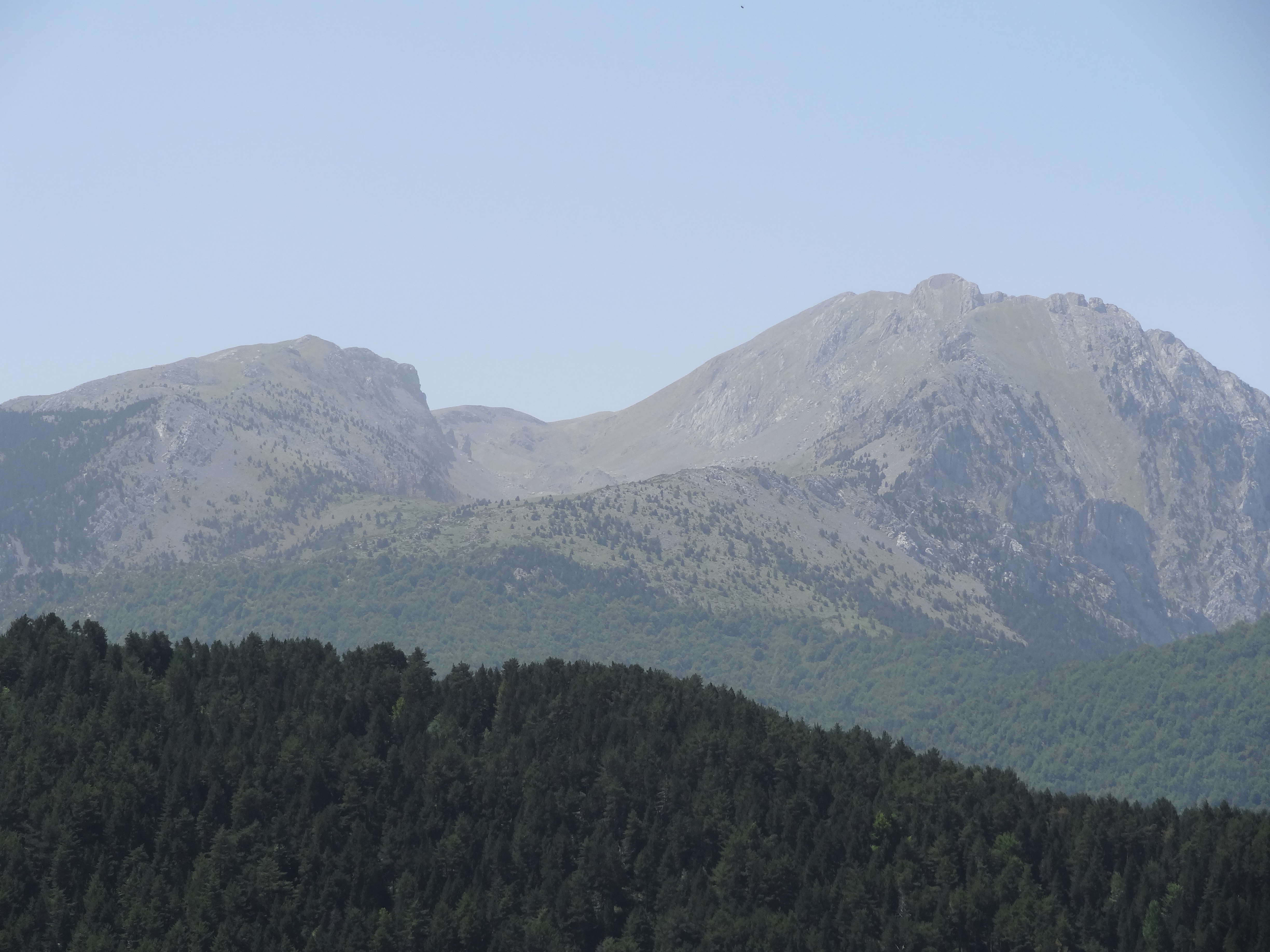 El Turbón from north